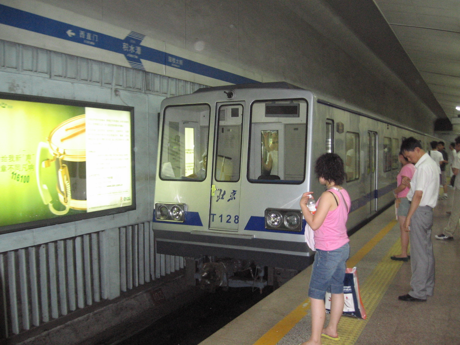 Beijing Line 2 at Jishuitan 积水潭站/積水潭站